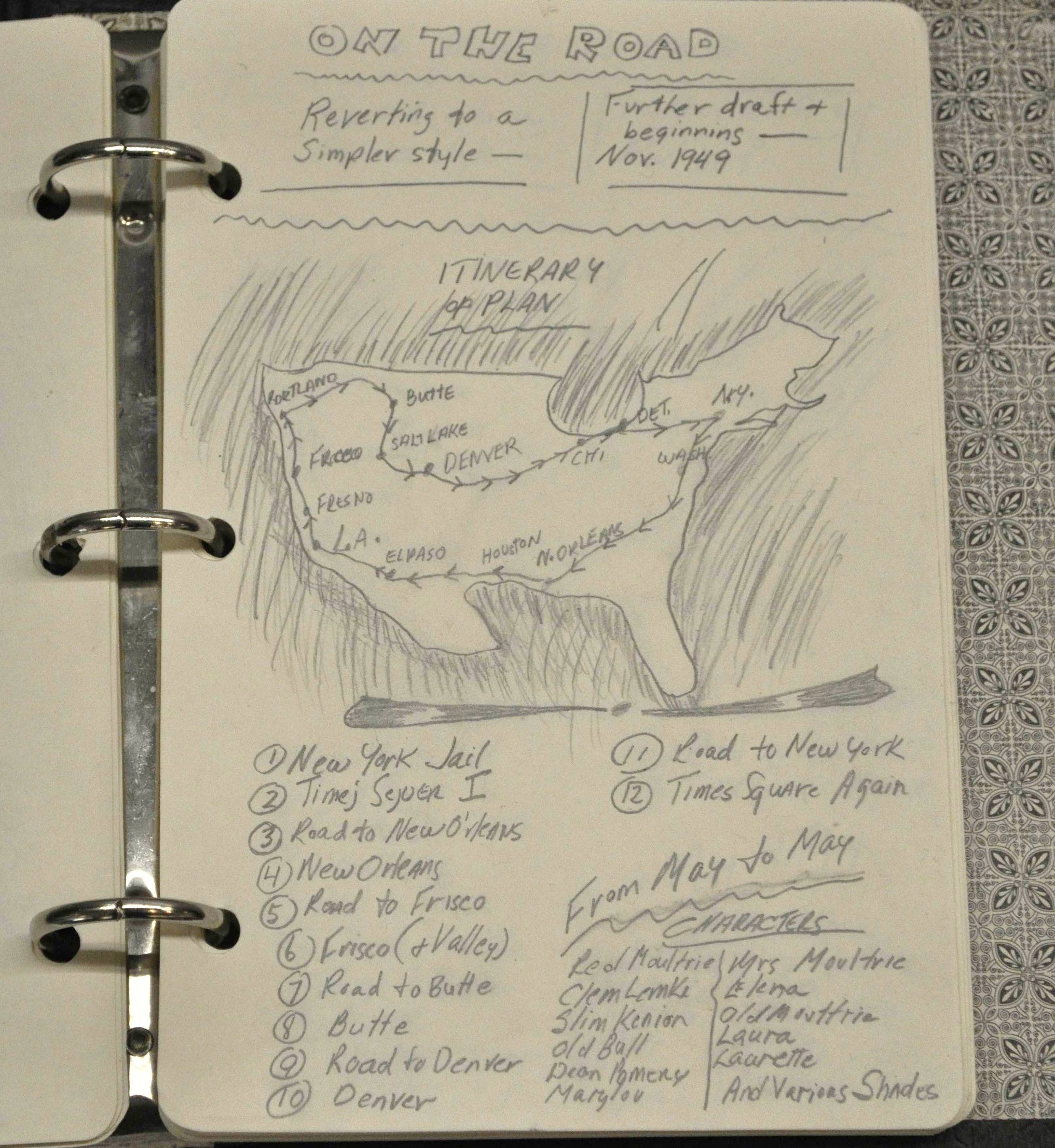 Copie d'une des dernières pages d'un des carnets préparatoires de Sur la route par Jack Kerouac, intitulé "Notes nocturnes et diagrammes pour Sur la route" (novembre 1949). Exposition "Sur la route deJack Kerouac : L'épopée, de l'écrit à l'écran" (16 mai - 19 août 2012) au Musée des lettres et manuscrits de Paris.